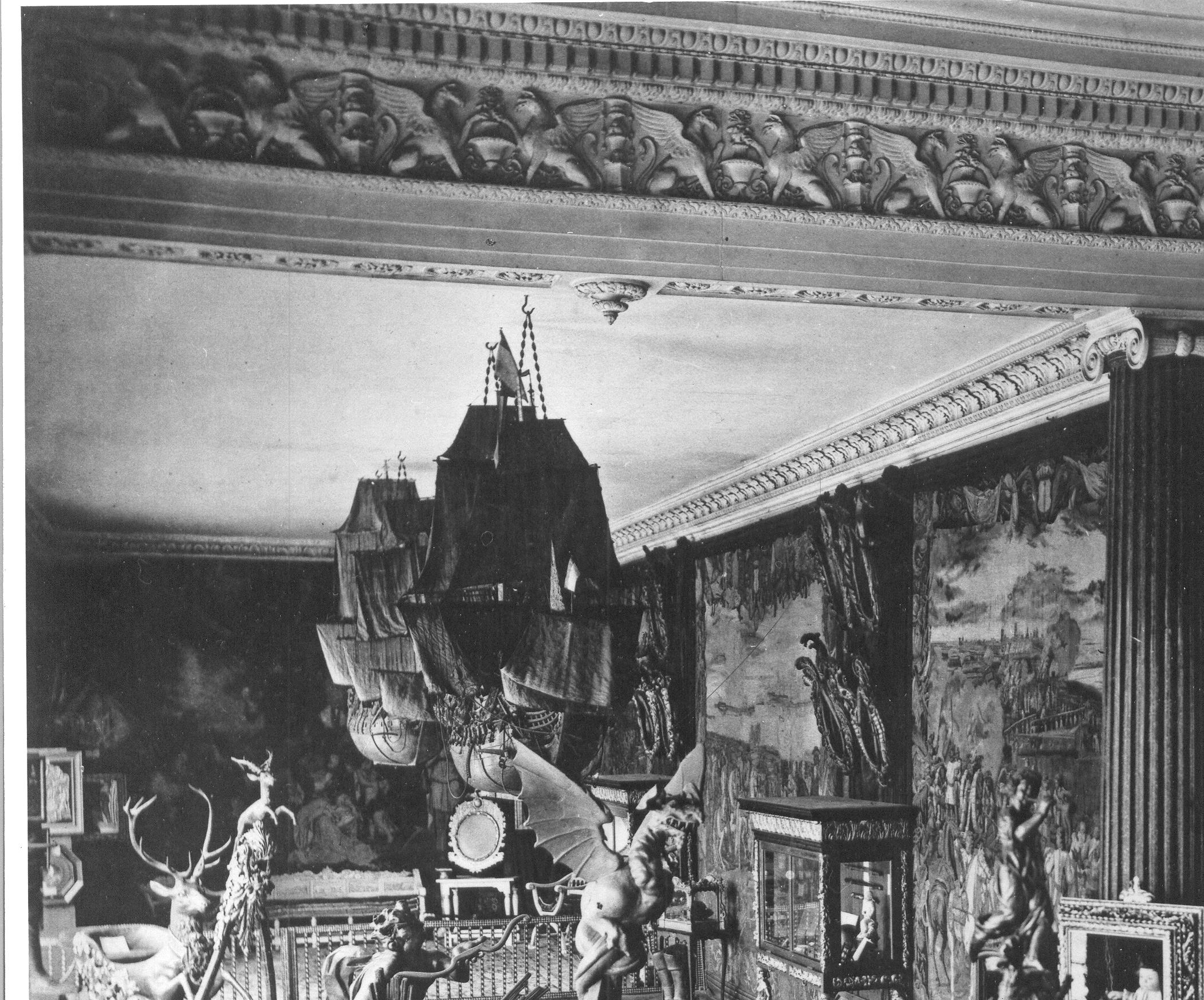 Hohenzollernmodell